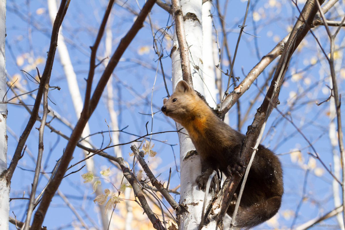 Ключевской природный парк: Мильковский район, Камчатский край This image is related to the protected area of Russia number 4110113